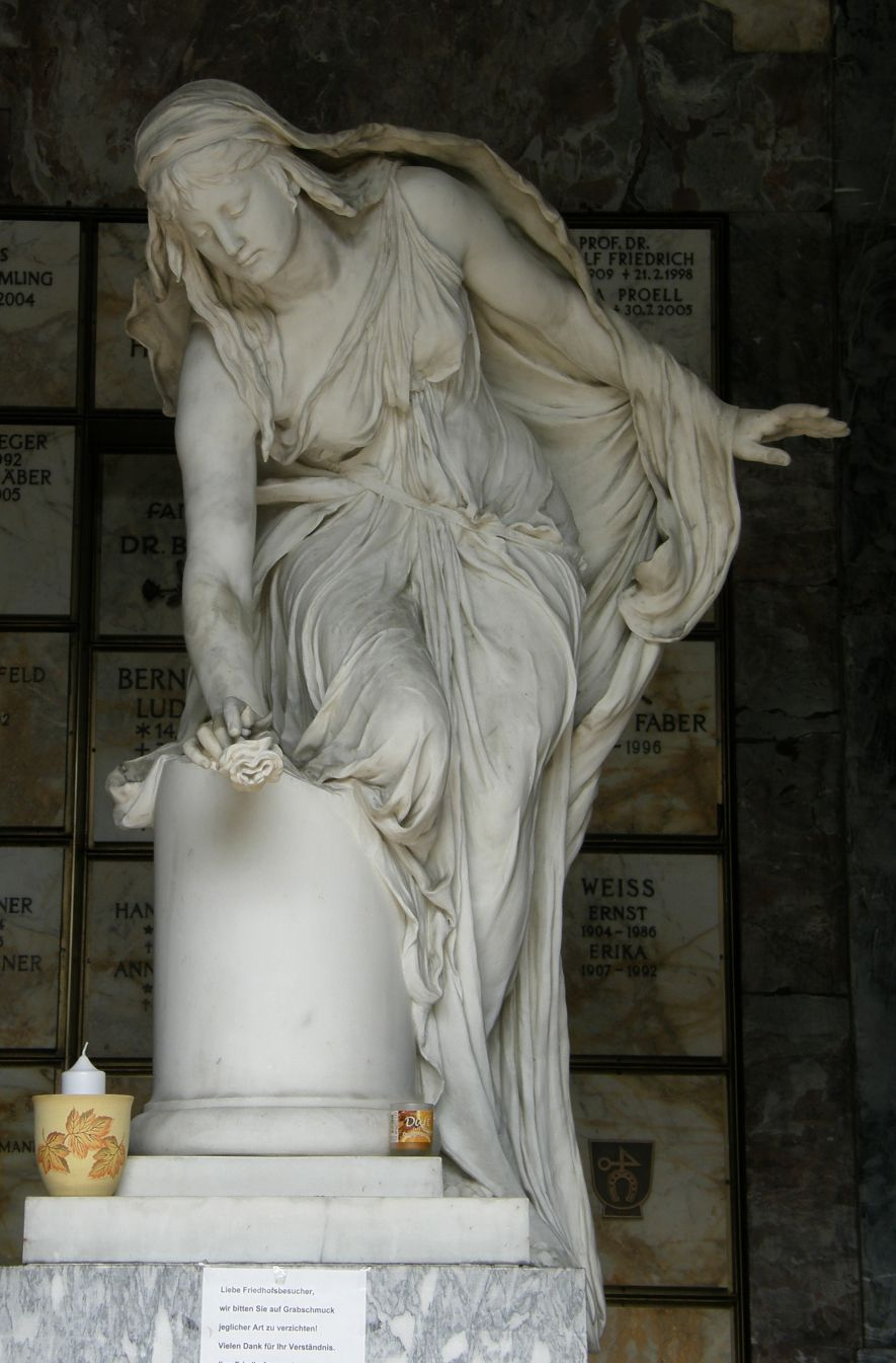 Hauptfriedhof Karlsruhe; Skulptur einer Trauernden im Mausoleum der Familie Bürklin